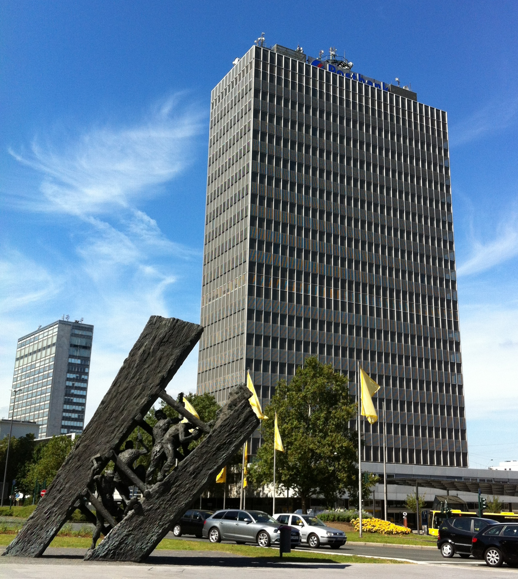 Essen: Bergarbeiterdenkmal "Steile Lagerung" vom Bildhauer Max Kratz, dahinter das Postbank-Hochhaus, links hinten Rheinstahl-Hochhaus